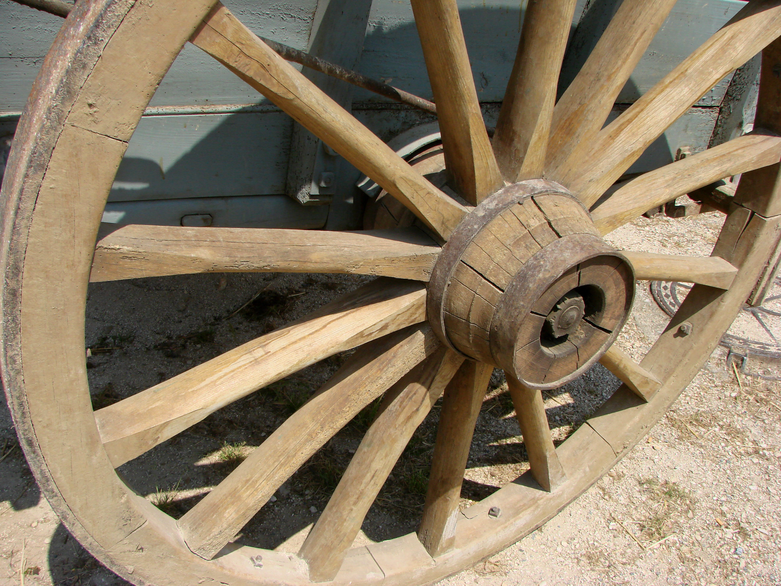 Hölzernes Rad einer Sturzkarre, aufgenommen in einem Dorf in den Ardennen, Frankreich.